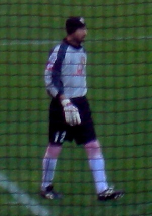 Alberto Fontana, US Palermo (Sampdoria vs Palermo, Italian Serie A 2007-08). Taken at Stadio Luigi Ferraris, Genoa.